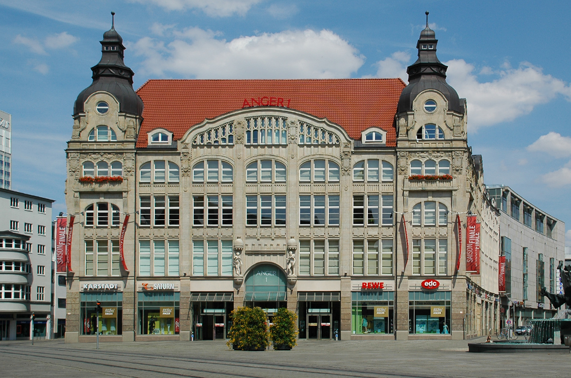 Westfassade des Einkaufszentrums Anger 1, am Anger in Erfurt